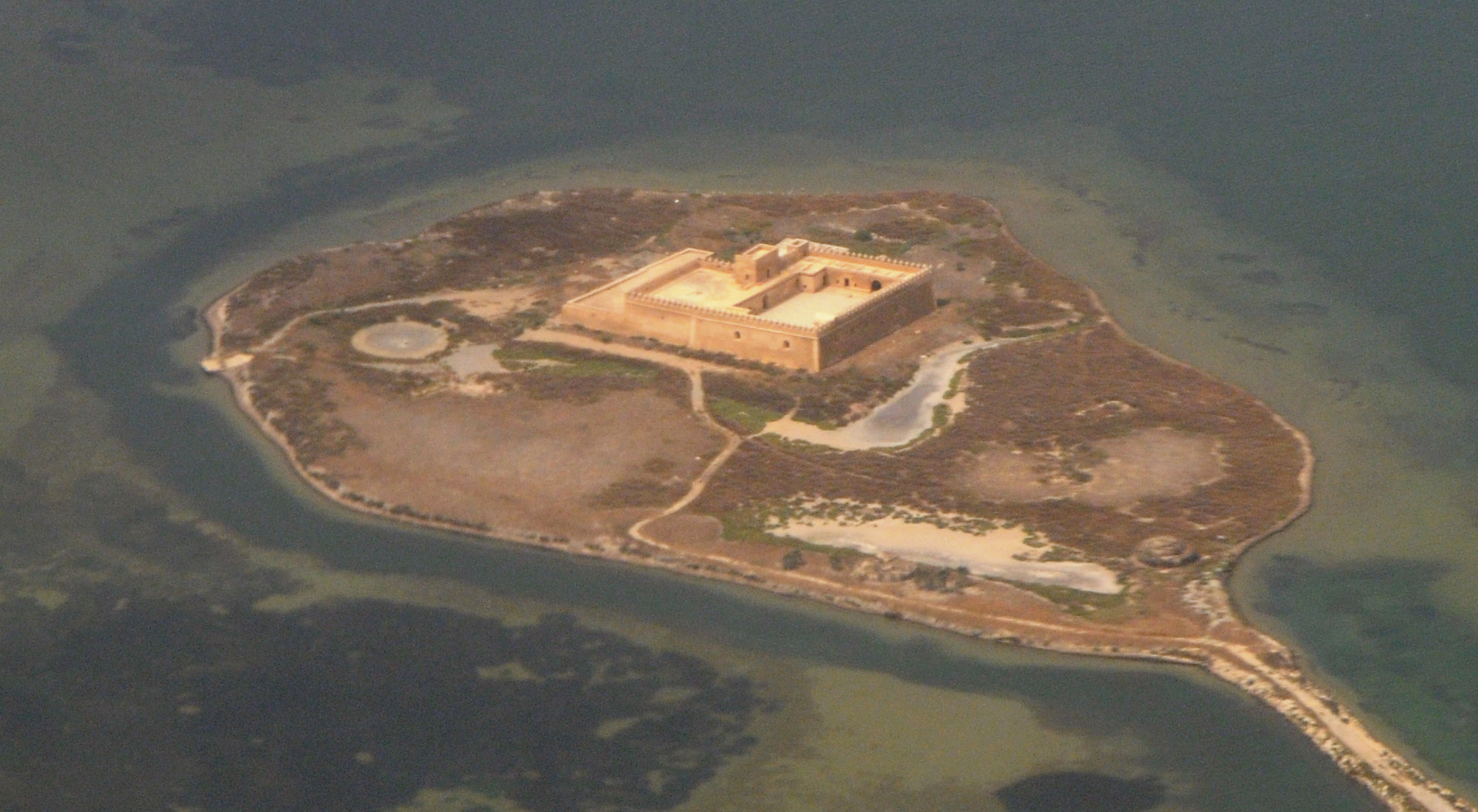 Zoom sur l'île Chikly dans le lac de Tunis